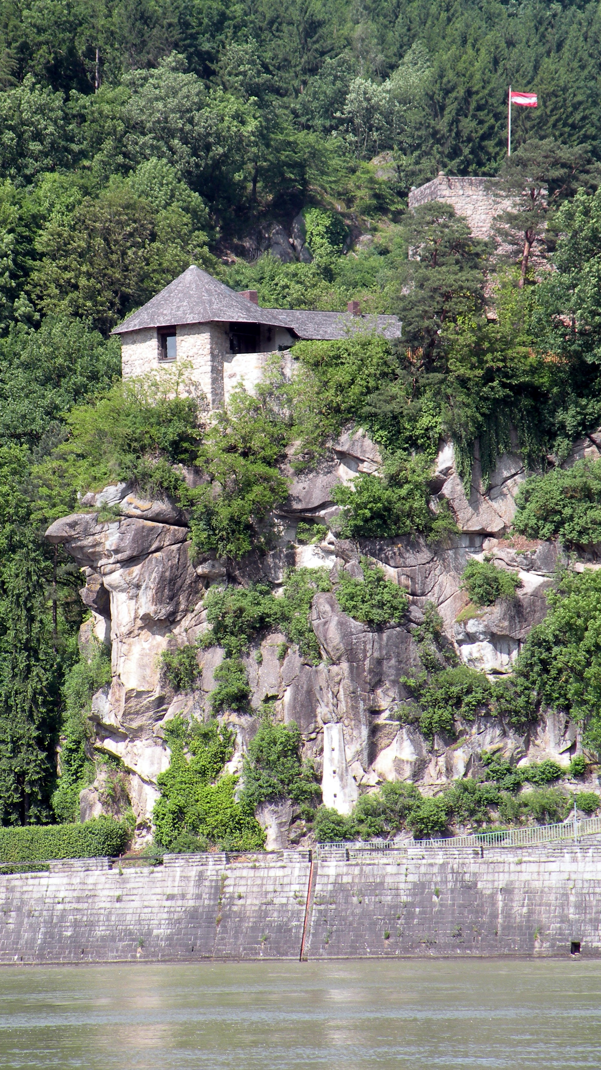 Burgruine Werfenstein (Privatbesitz)